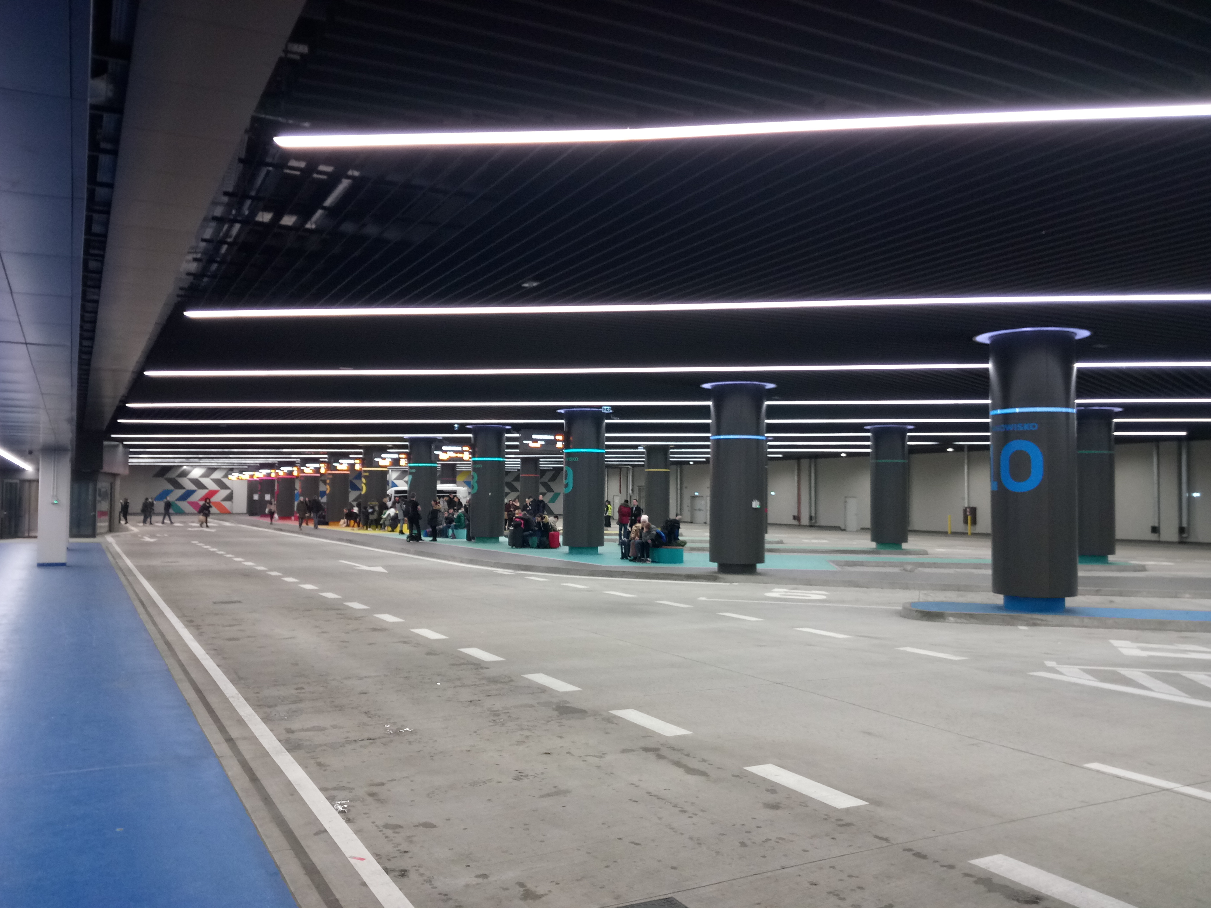 stanowiska autobusowe Dworca Wrocław